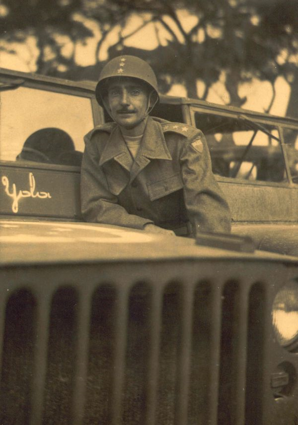 O primeiro Comandante da Cia C 1ª DE, Cap Theophilo